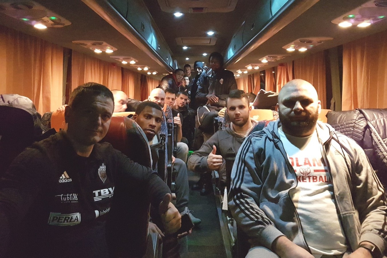 TBV Start Lublin (03.01.2018)